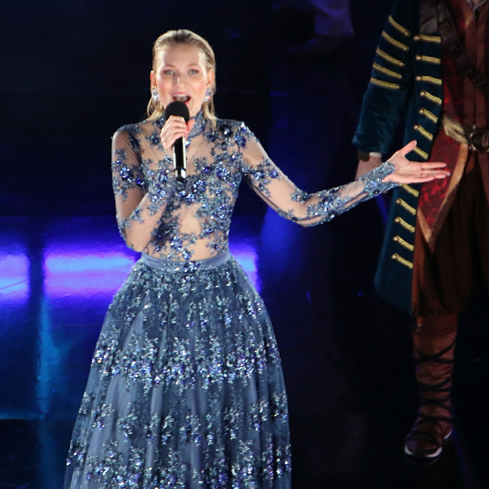 Carolin Niemczyk vom Duo "Glasperlenspiel" bei der Taufzeremonie der Mein Schiff 2